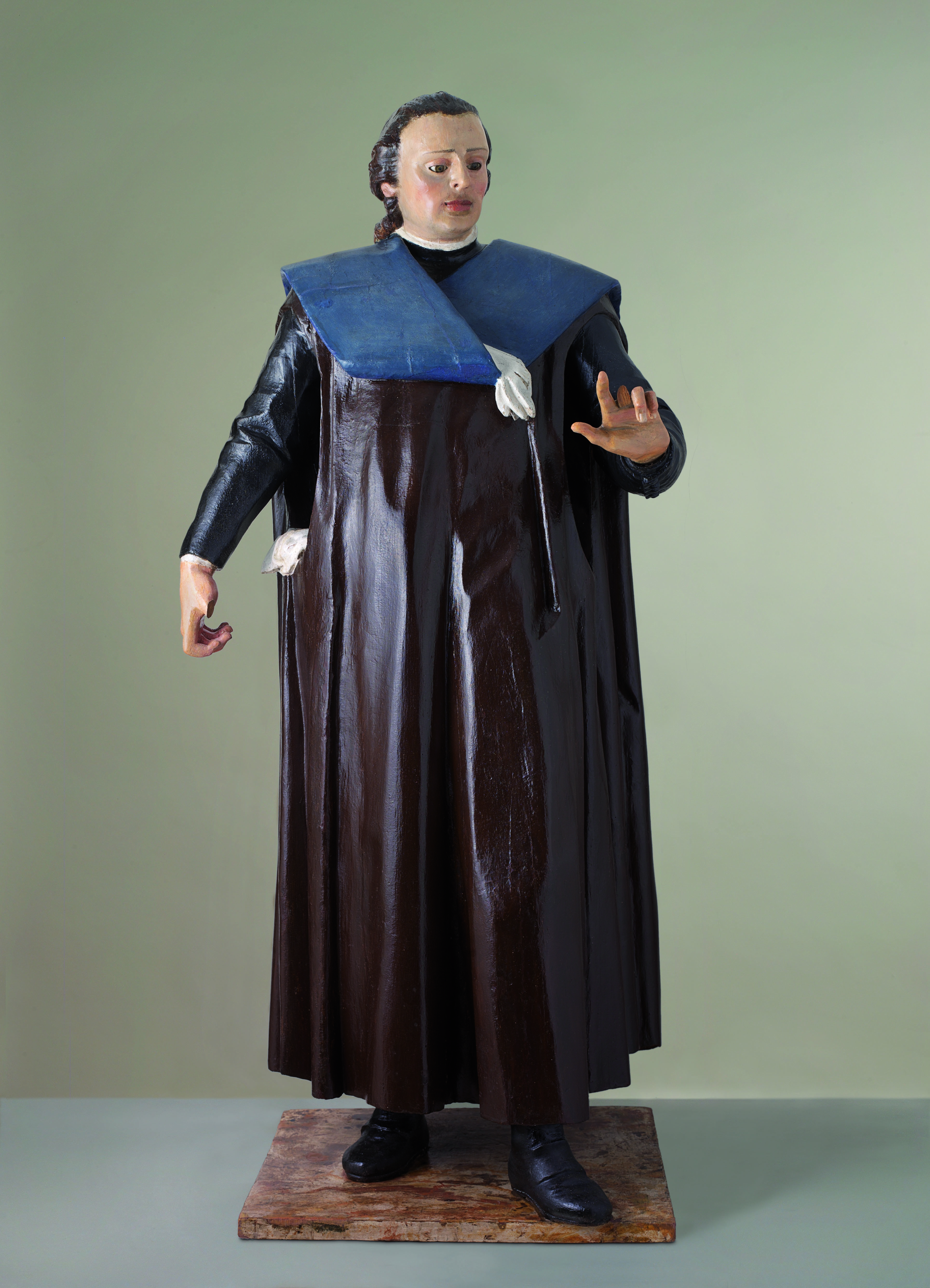 Colegial de Salamanca. Primer cuarto del s. XVIII. Talla en madera policromada.